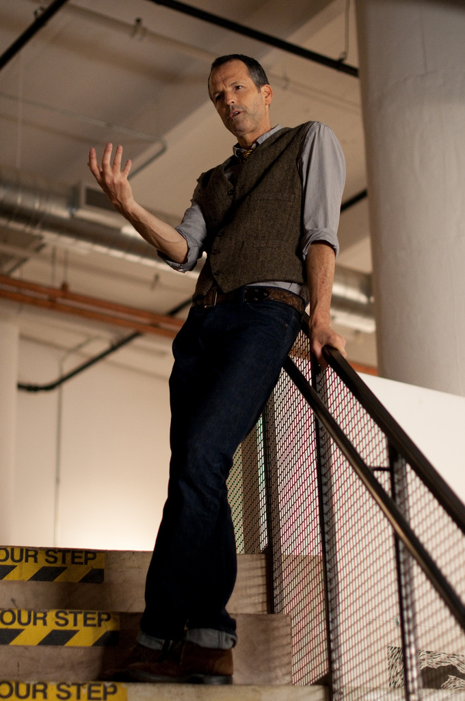 Hillman Curtis